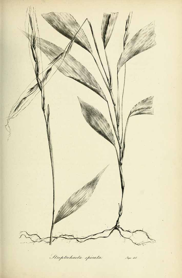 Streptochaeta spicata Schrad. ex Nees